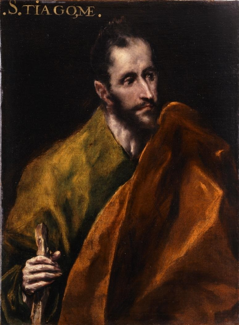 La obra representa al apóstol Santiago el Menor, uno de los doce Apóstoles.